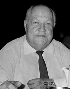 Vladimir Sapožnin